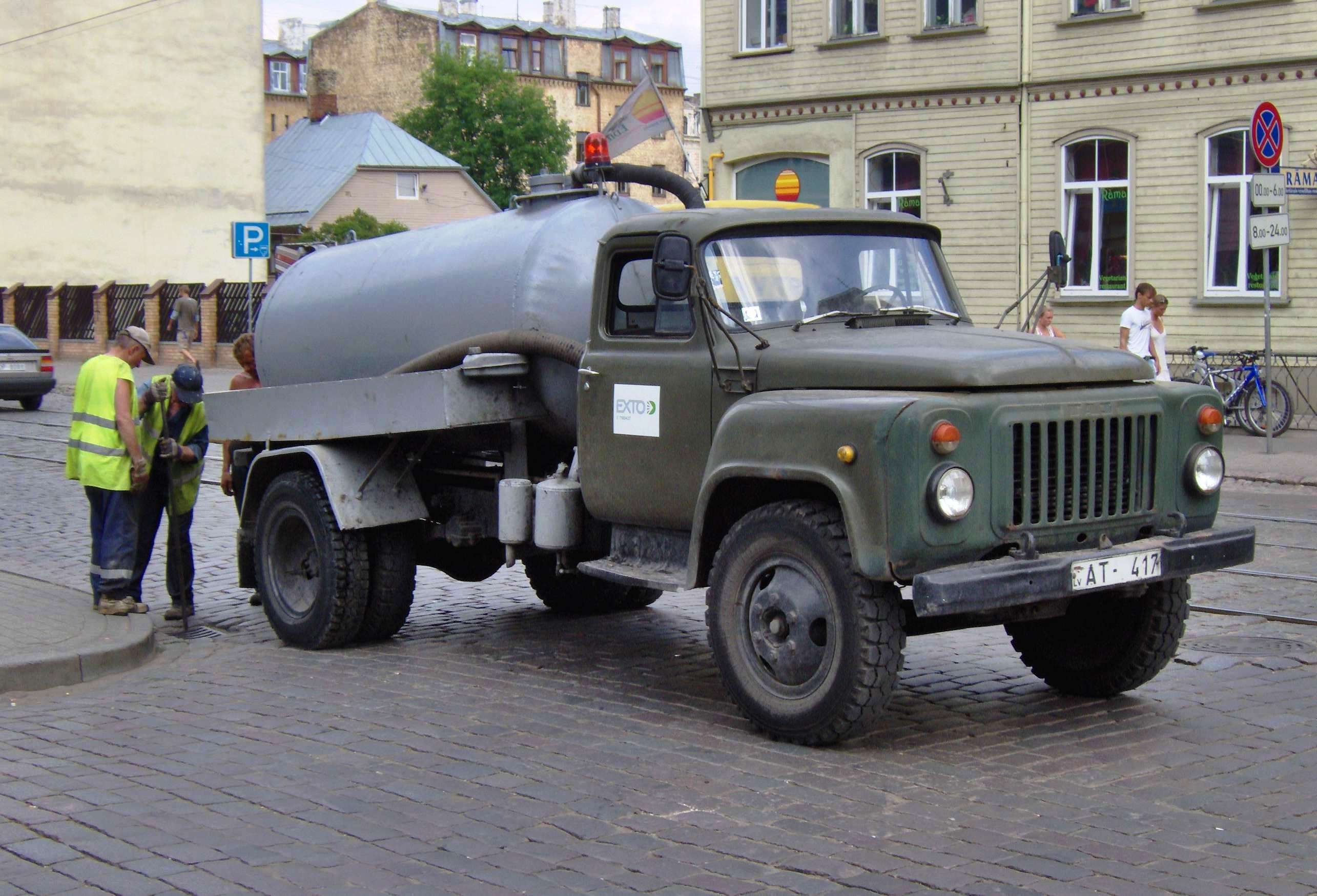 Čištění kanalizačních vpustí na ulici Krišjāņa Barona